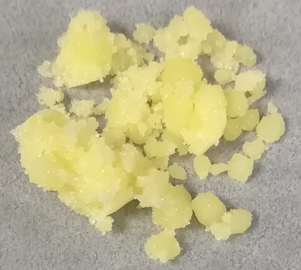 中文（中国大陆）: 氯化钐(III)六水合物，纯度99.99%-Sm